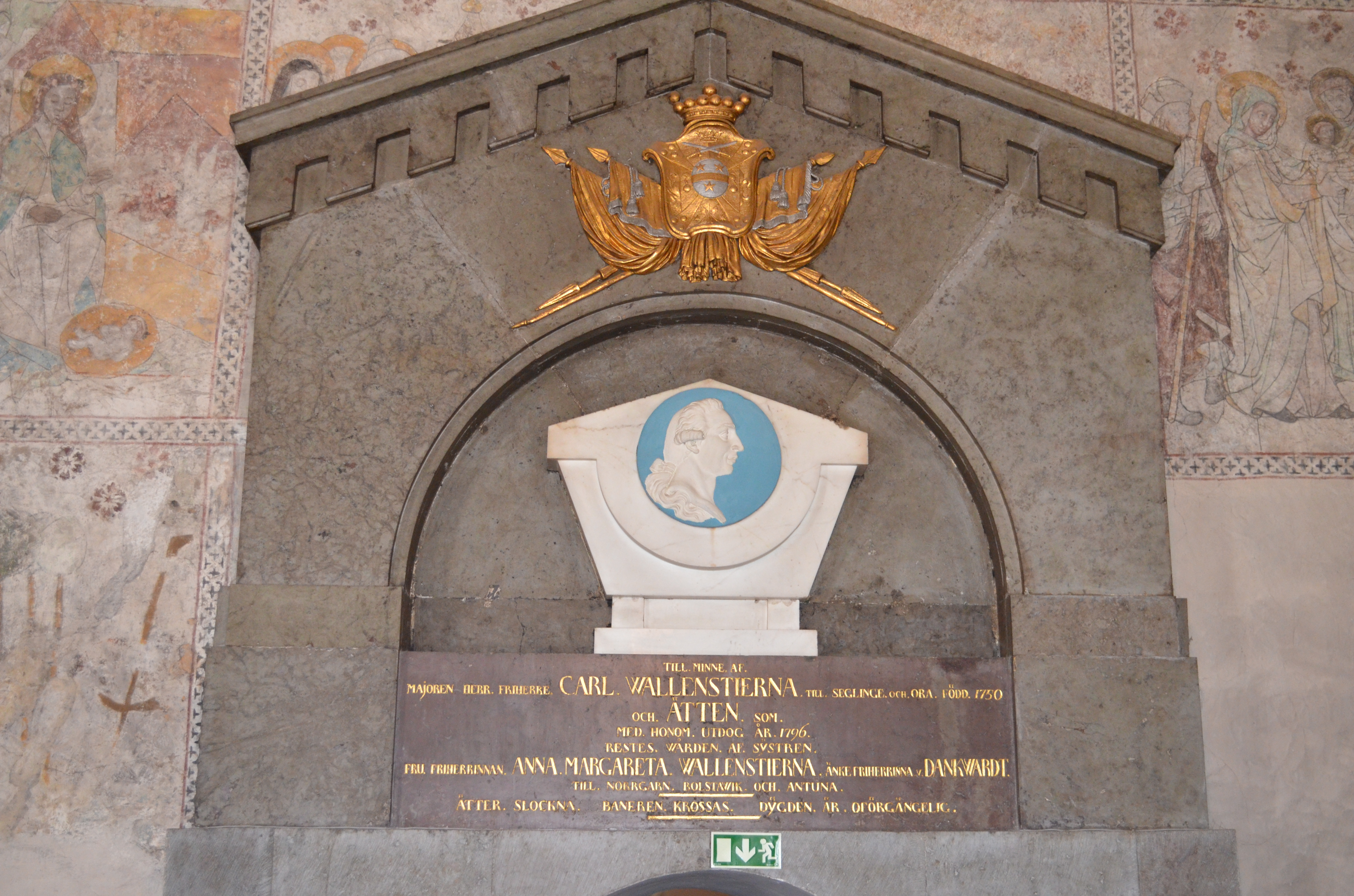 Epitafium över Carl Wallesntierna (d 1796) i Almunge kyrka, Uppland